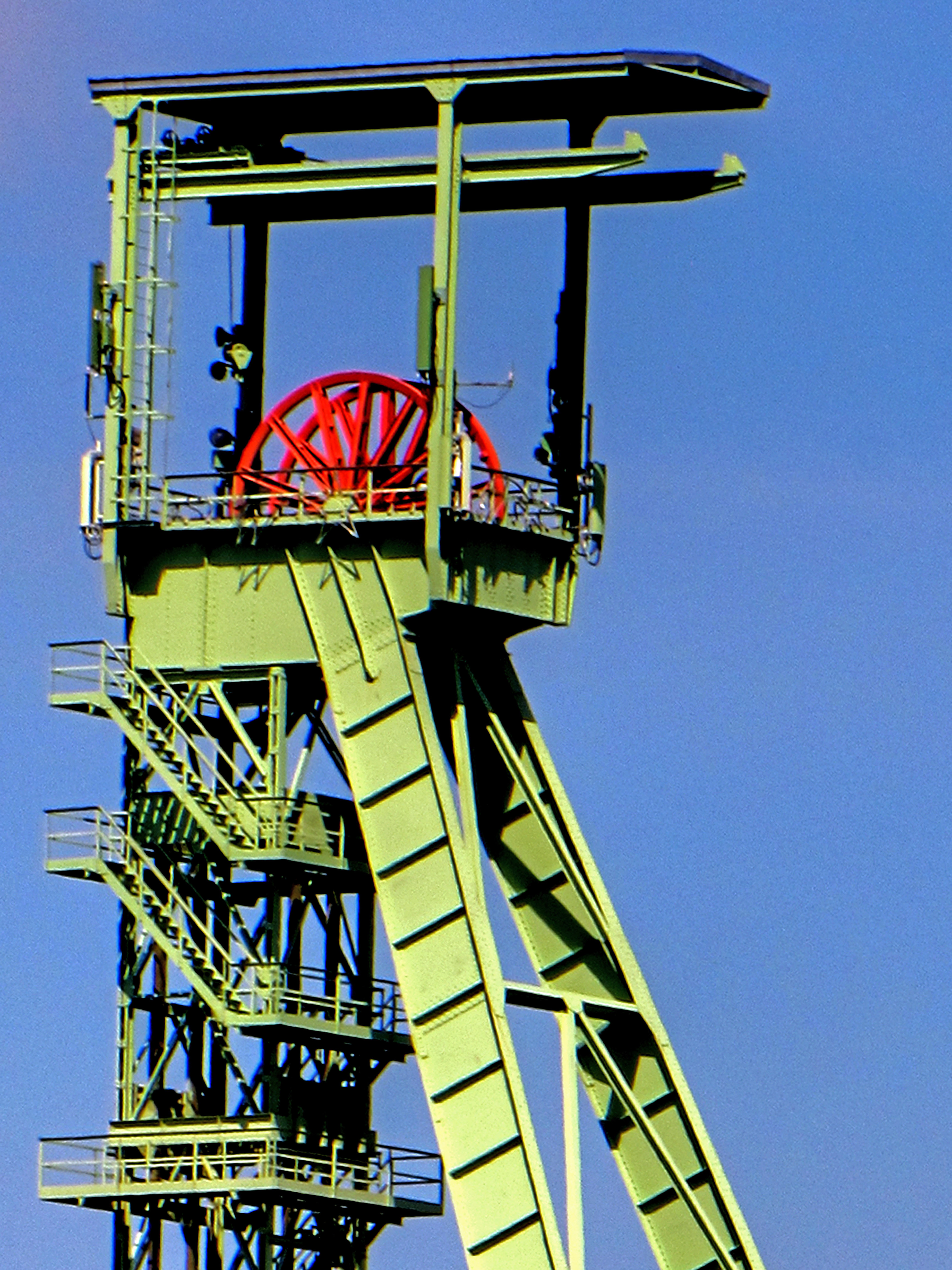 Weithin sichtbar ist das Wahrzeichen, der Förderturm